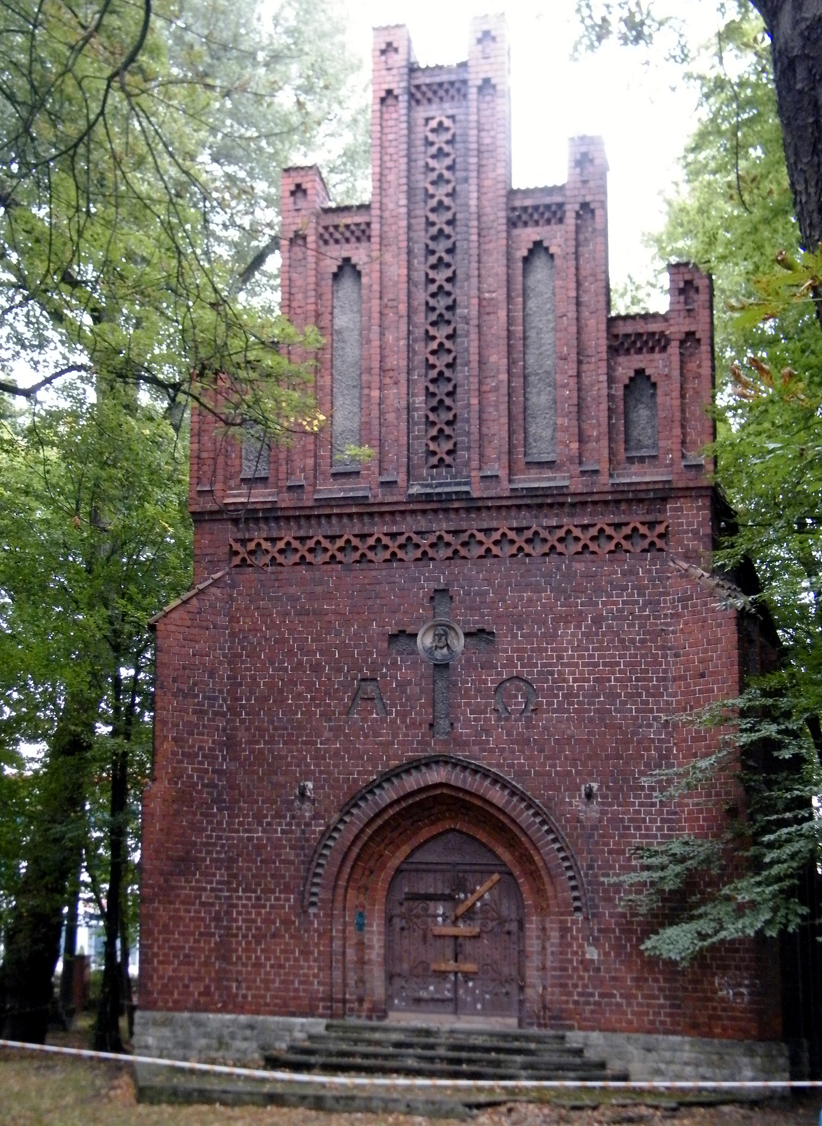 zespół cmentarza komunalnego Cmentarz komunalny, 1813, XIX/XX Kaplica, mur., 1902 Ogrodzenie, mur., XIX/XX Opole, ul. Wrocławska, Opole